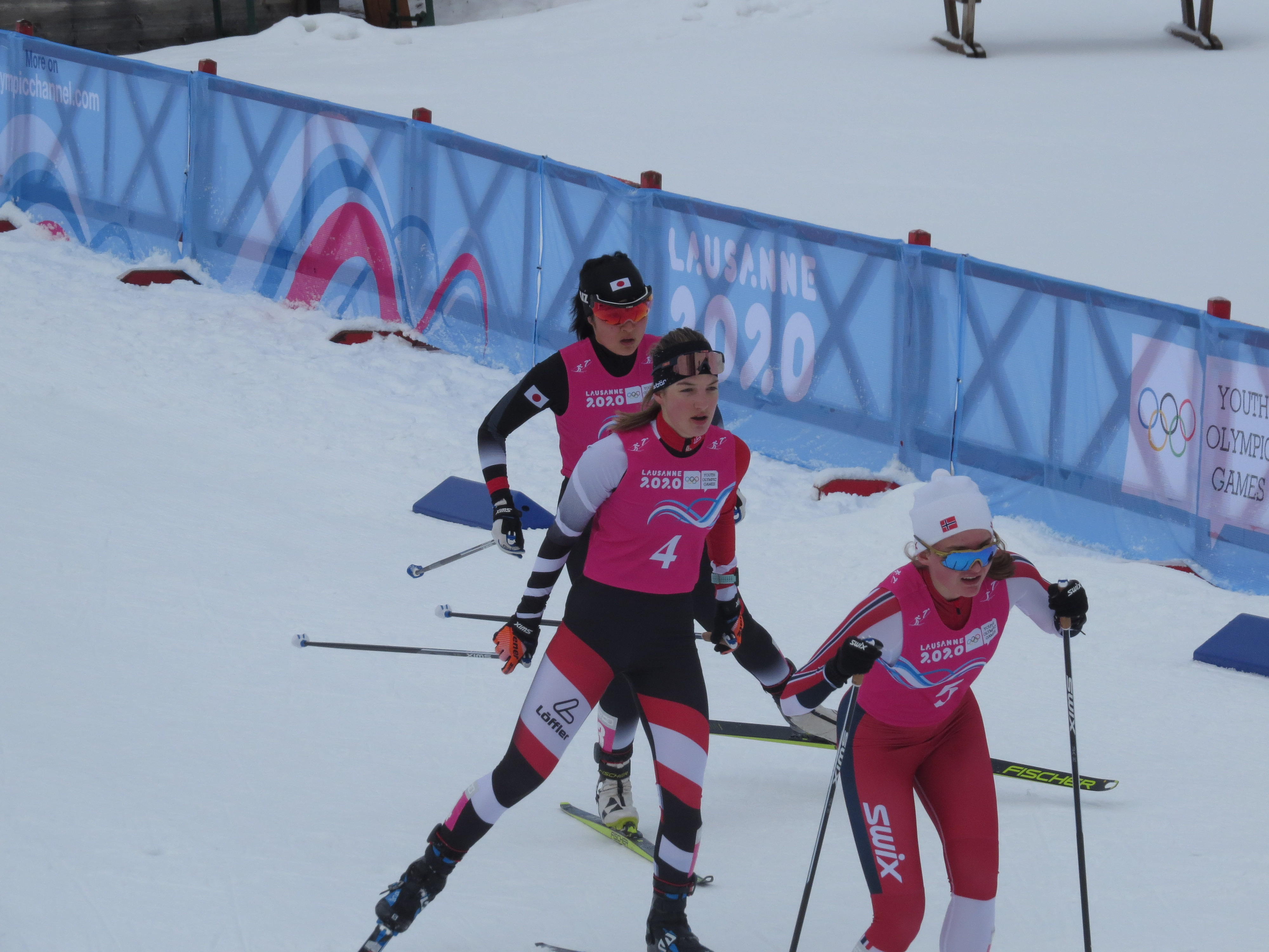 Gyda Westvold Hansen, Lisa Hirner et Ayane Miyazaki à la mi-course de la course de ski de fond.